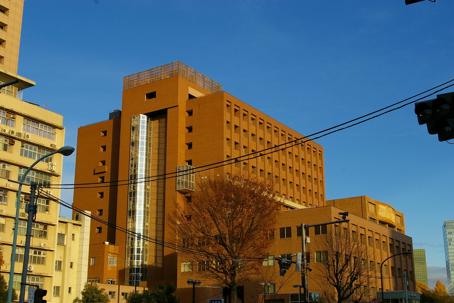 東京医科歯科大学